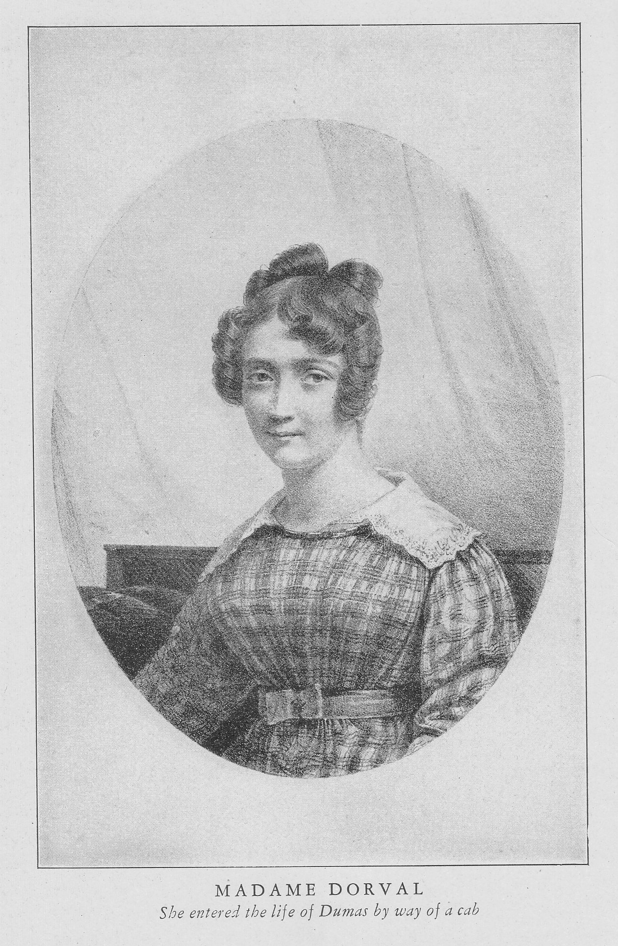 Marie Dorval. Portrait tiré de ‹La Dernière année de Marie Dorval›, d'Alexandre Dumas (1855).